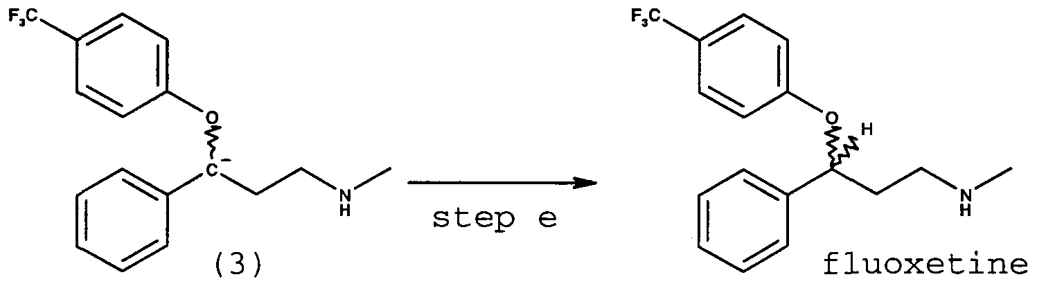 ы